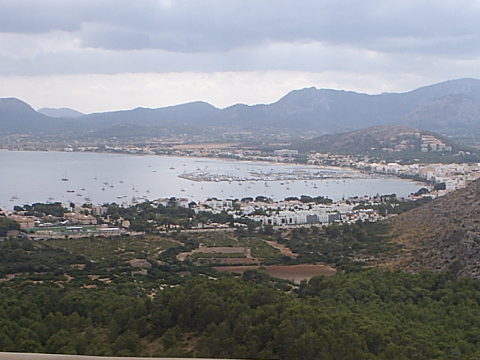 Bahía de Pollensa, isla de Mallorca, España.